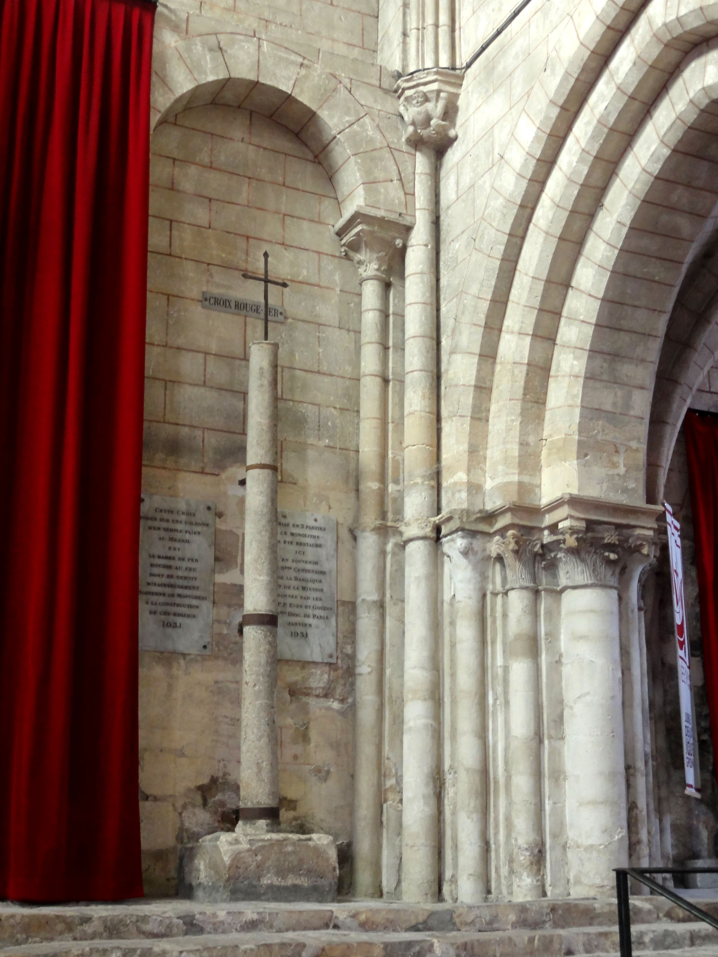 Croix Rouge Fer (voir les plaque commémoratives).